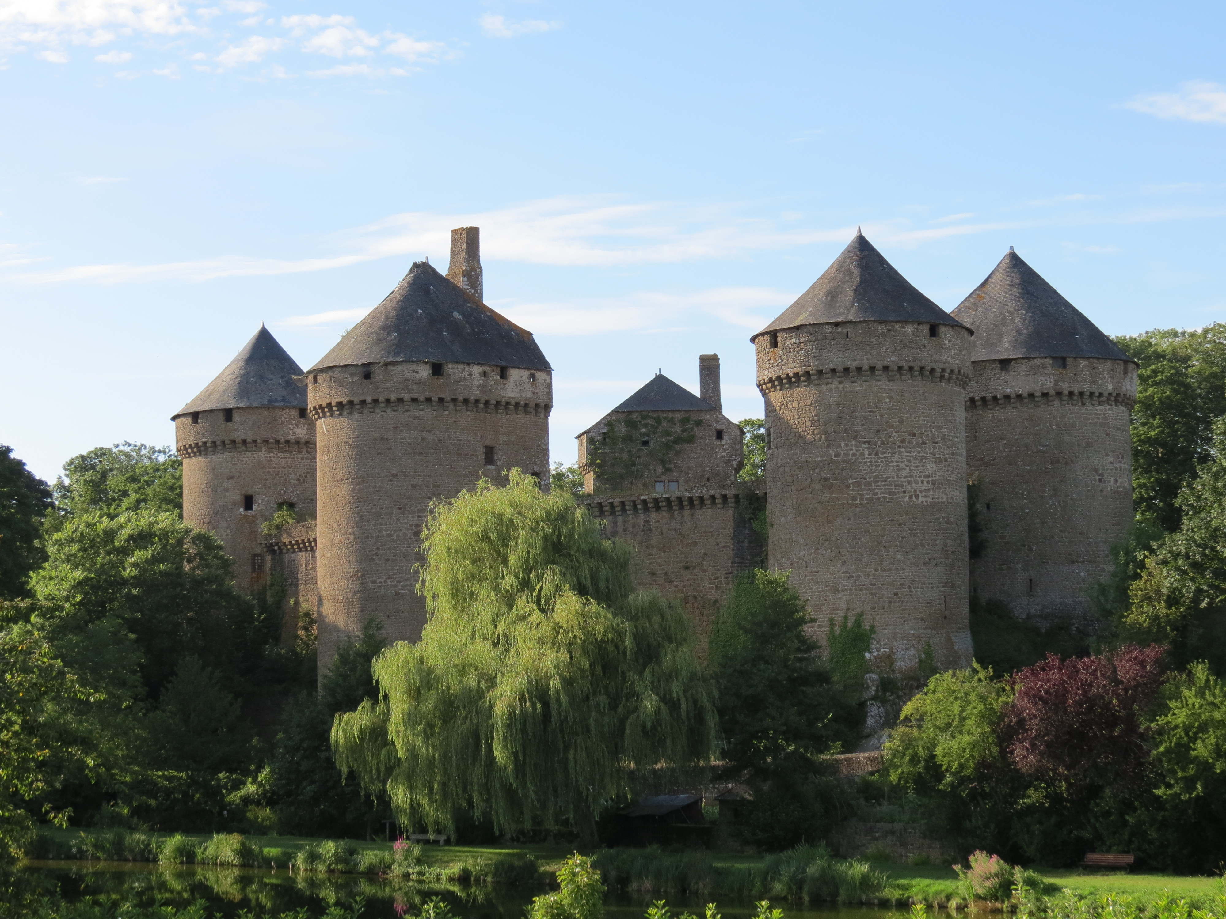 Château de Lassay, dans la Mayenne, Pays de la Loire. Object location48° 26′ 20″ N, 0° 30′ 00″ W